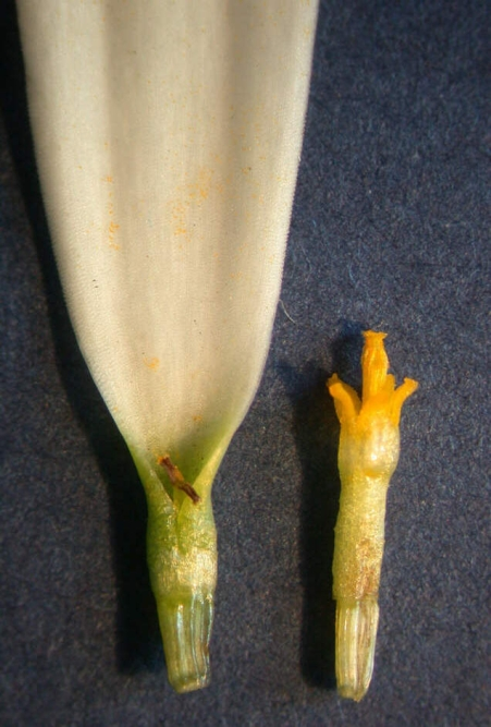 Beschreibung: Eine Strahlen- und eine (männliche) Röhrenblüte der Margerite. Die Strahlenblüte zeigt noch eine rudimentäre Narbe.